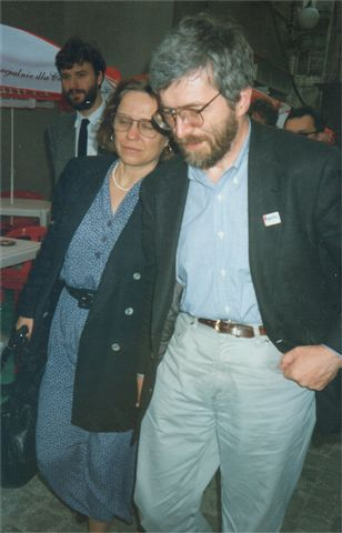 Stanisław Barańczak (1946-2014), Polish writer and his wife, Anna